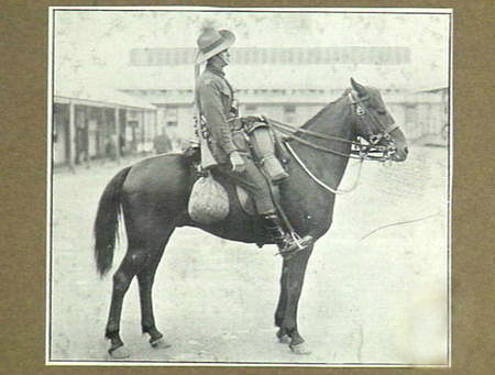 Vista lateral de un jinete de Australia con el uniforme y el equipo completo montado en su caballo. Unidad de caballería ligera.